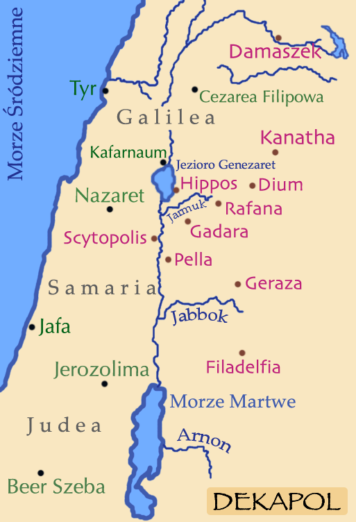 Dekapol-mapka